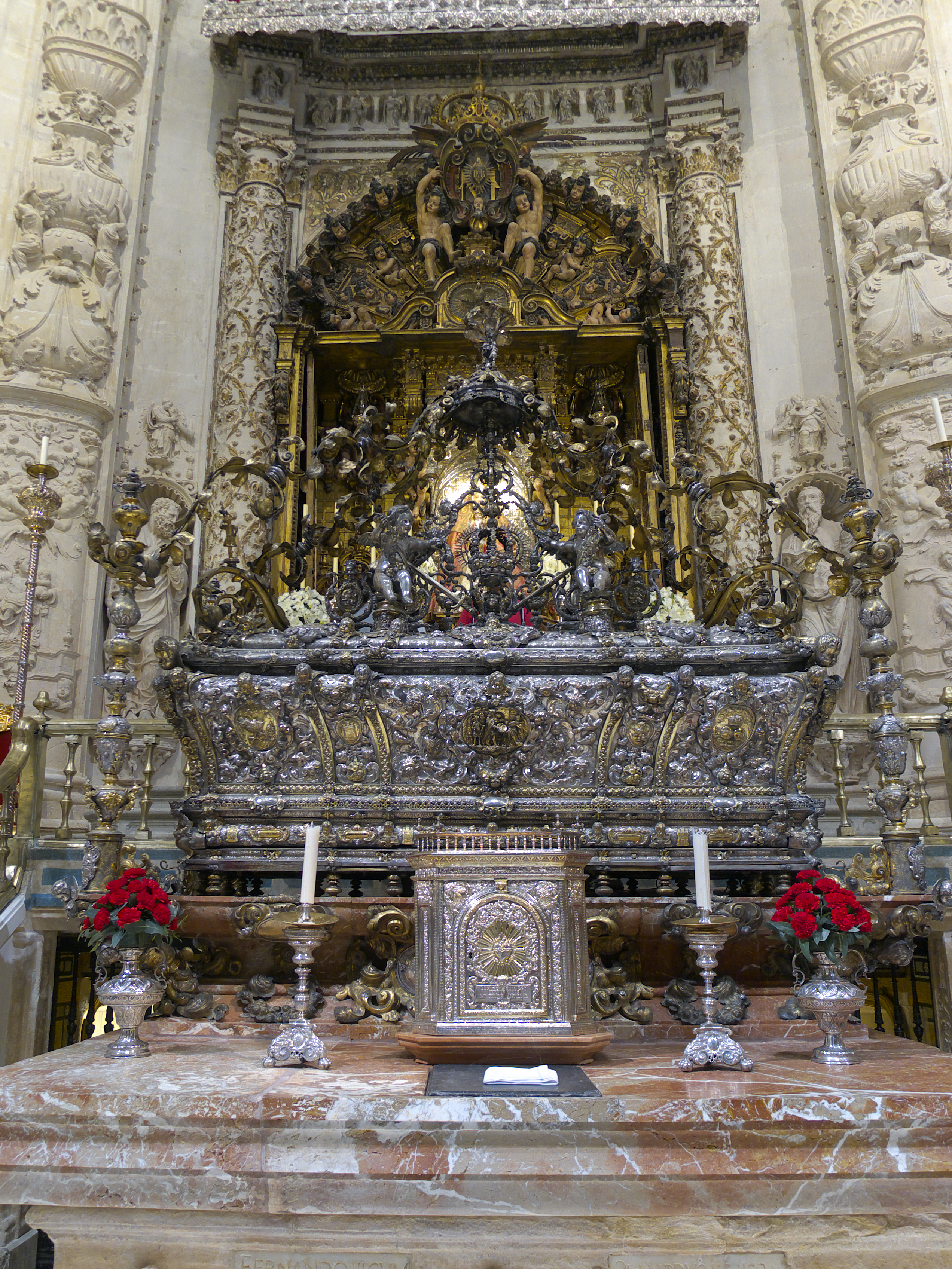 En primer plano aparece la urna barroca de plata que contiene el cuerpo incorrupto del rey Fernando III el Santo († 1252) y que fue terminada por el orfebre Juan Laureano de Pina en el año 1719.